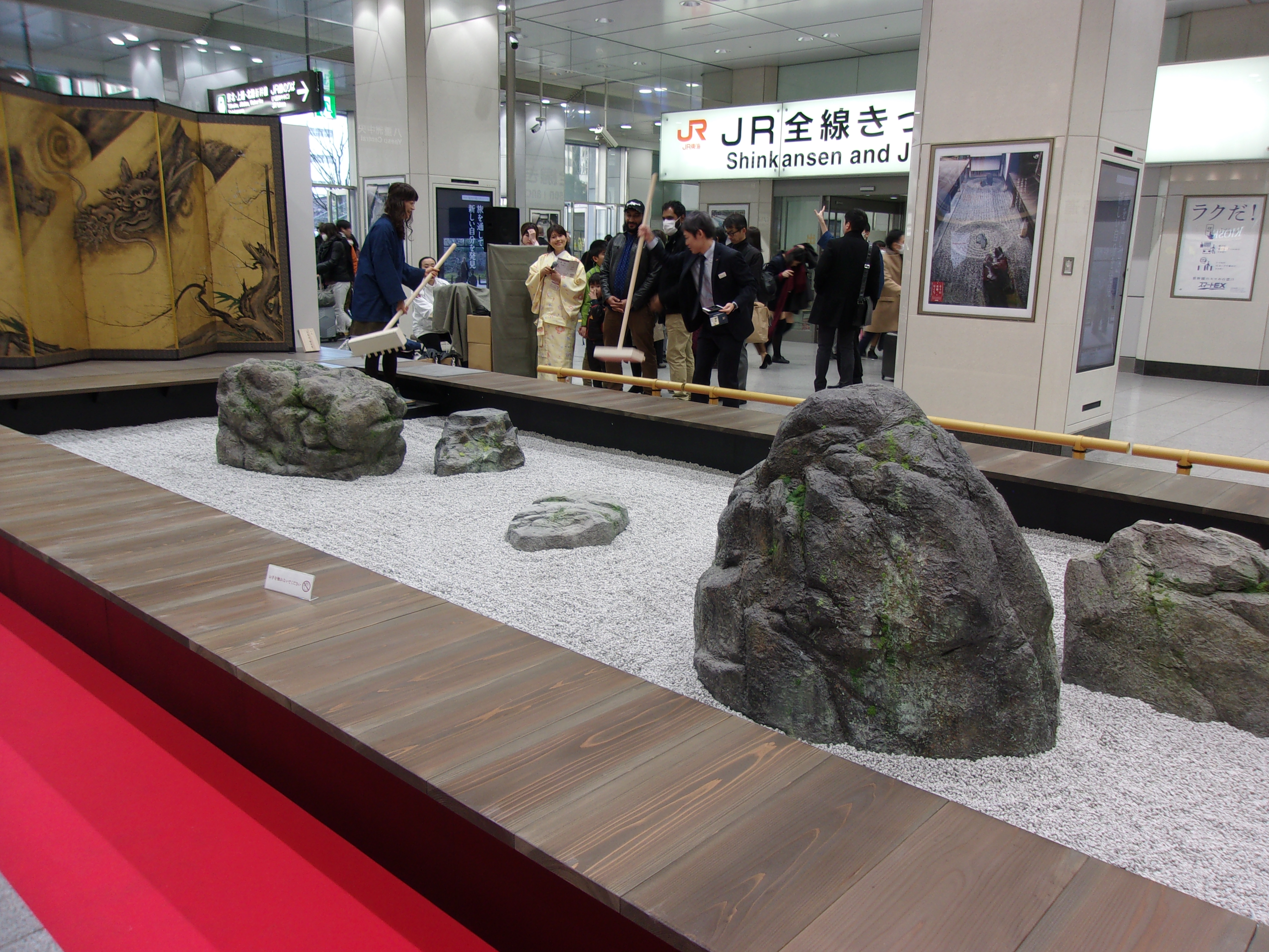 JR東海の「そうだ、京都行こう」の2020年最初のキャンペーンとなる庭園散策ツアーを盛り上げるため、東京駅八重洲中央口コンコースに設営された箱庭的な石庭